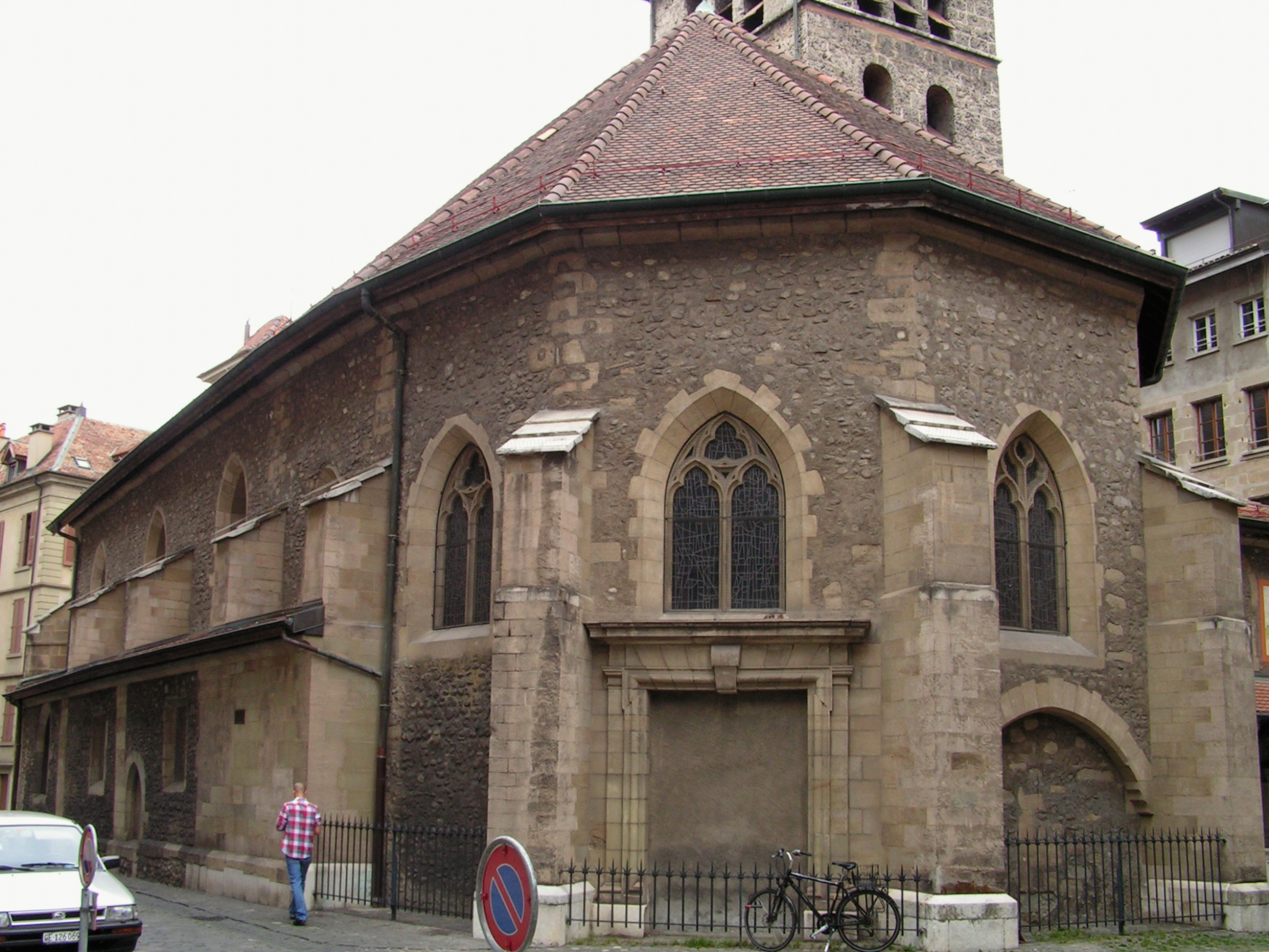 Rue de Saint-Germain 2, Genève. Église Saint-Germain.